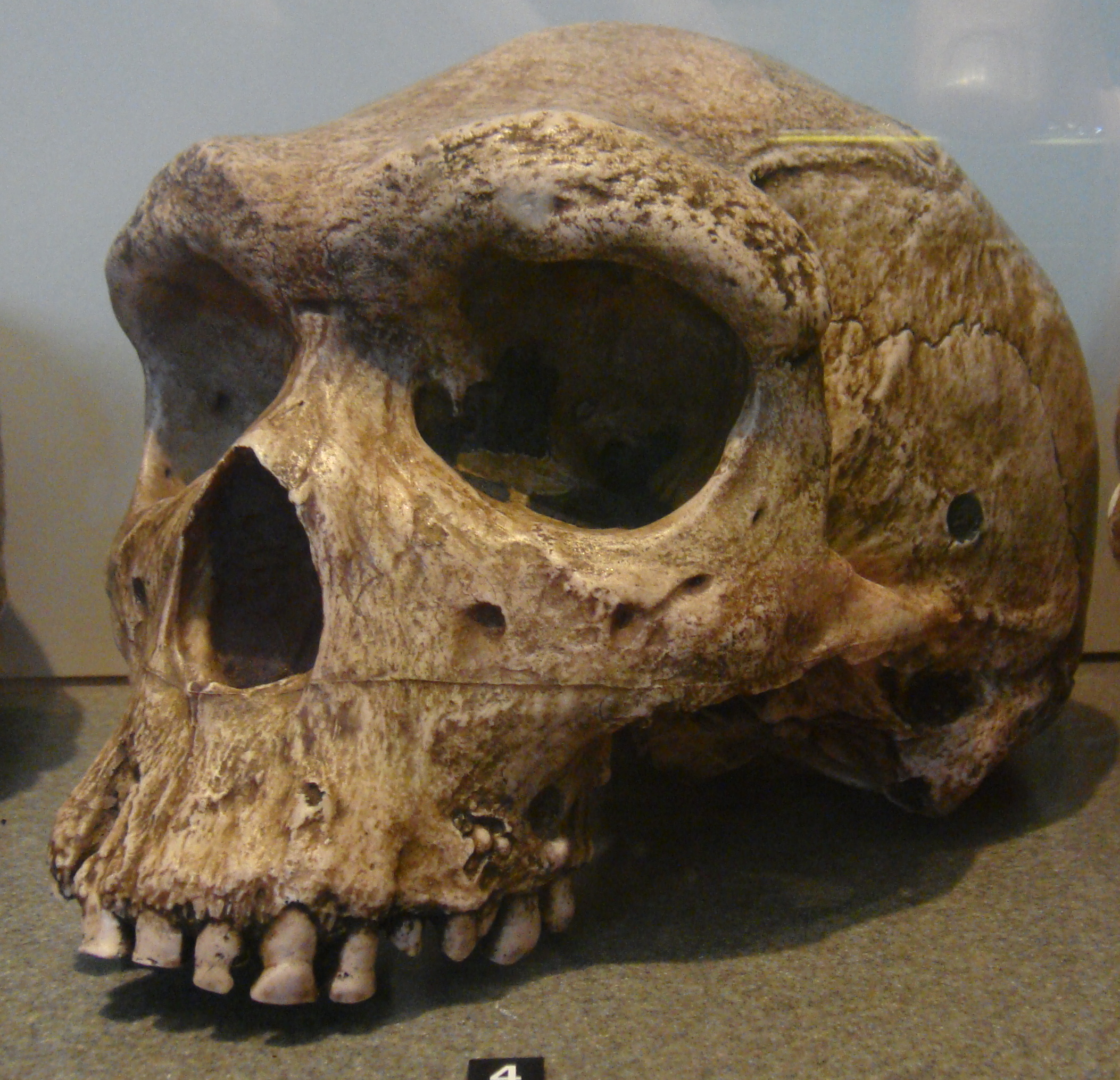 Réplica en Kelvingrove Art Gallery and Museum of Glasgow. Salas de Prehistoria humana. Réplica del cráneo de Kabwe, Broken Hill 1. Este individuo de H. heildelbergensis de entre 125 y 300 mil años padecía caries en diez de sus dientes superiores, el caso más antiguo datado.